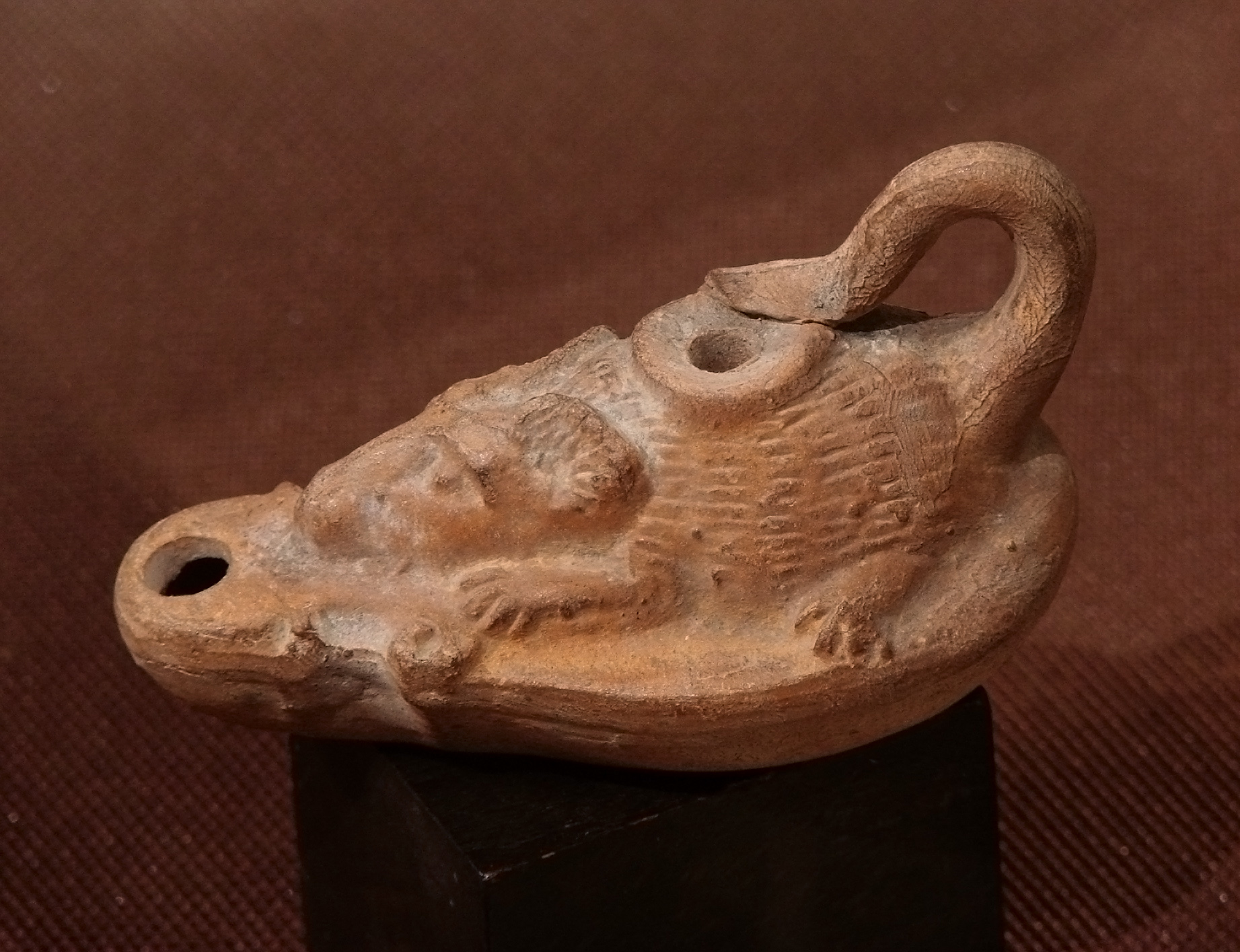 Lampe à huile, figurant une souris, 1er siècle aprés JC, Asie Mineure (?). Musée de Laon.